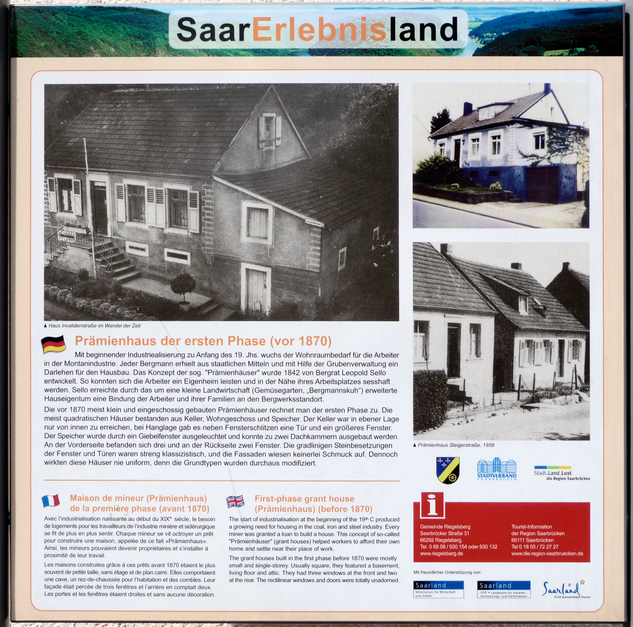 Infotafel Prämienhaus der ersten Phase